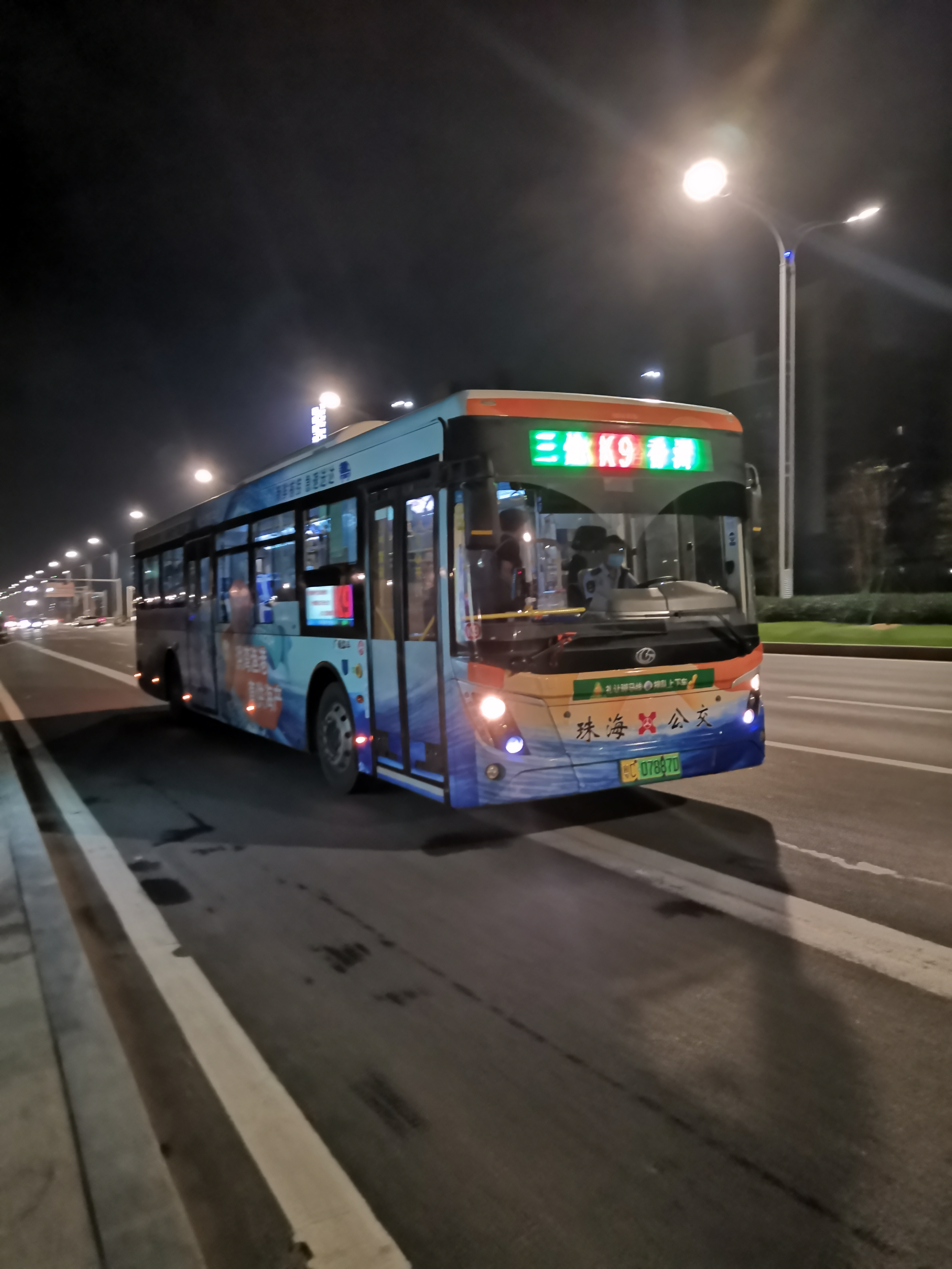 中文（中国大陆）: 珠海公交K9快线